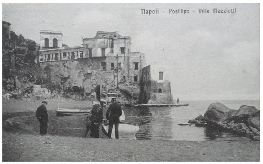 Riquadro con Cartolina di Villa Mazziotti a Posillipo